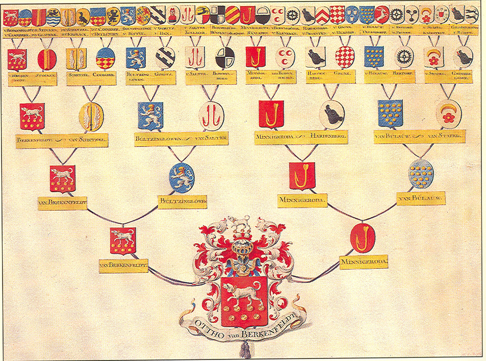 Afbeelding uit de 18e eeuw Gemeentearchief Rotterdam